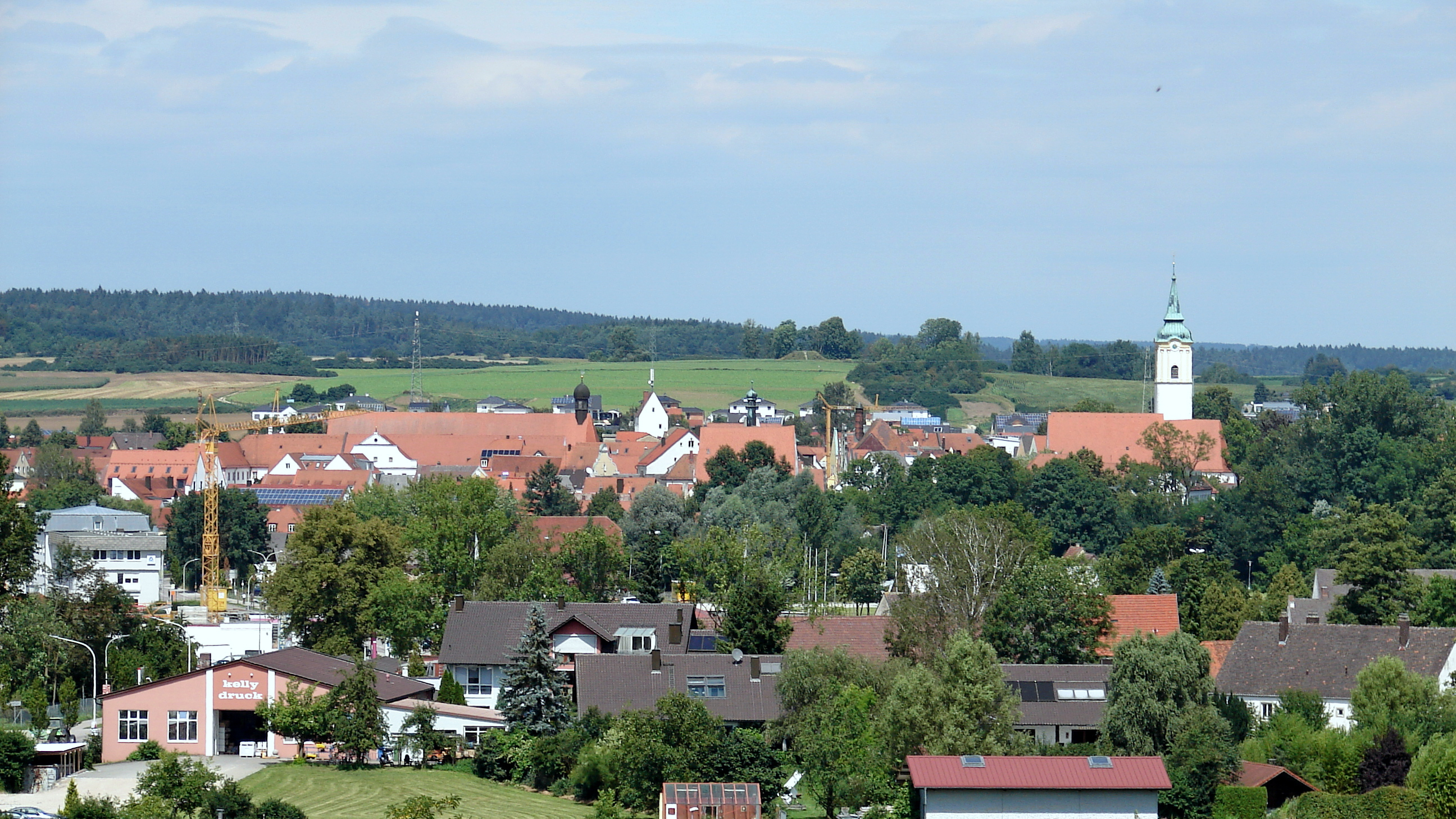 Abensberg ist eine Stadt im niederbayerischen Landkreis Kelheim und liegt etwa 30 Kilometer südwestlich von Regensburg, 40 Kilometer östlich von Ingolstadt, 50 Kilometer nordwestlich von Landshut und gut 100 Kilometer nördlich von München.